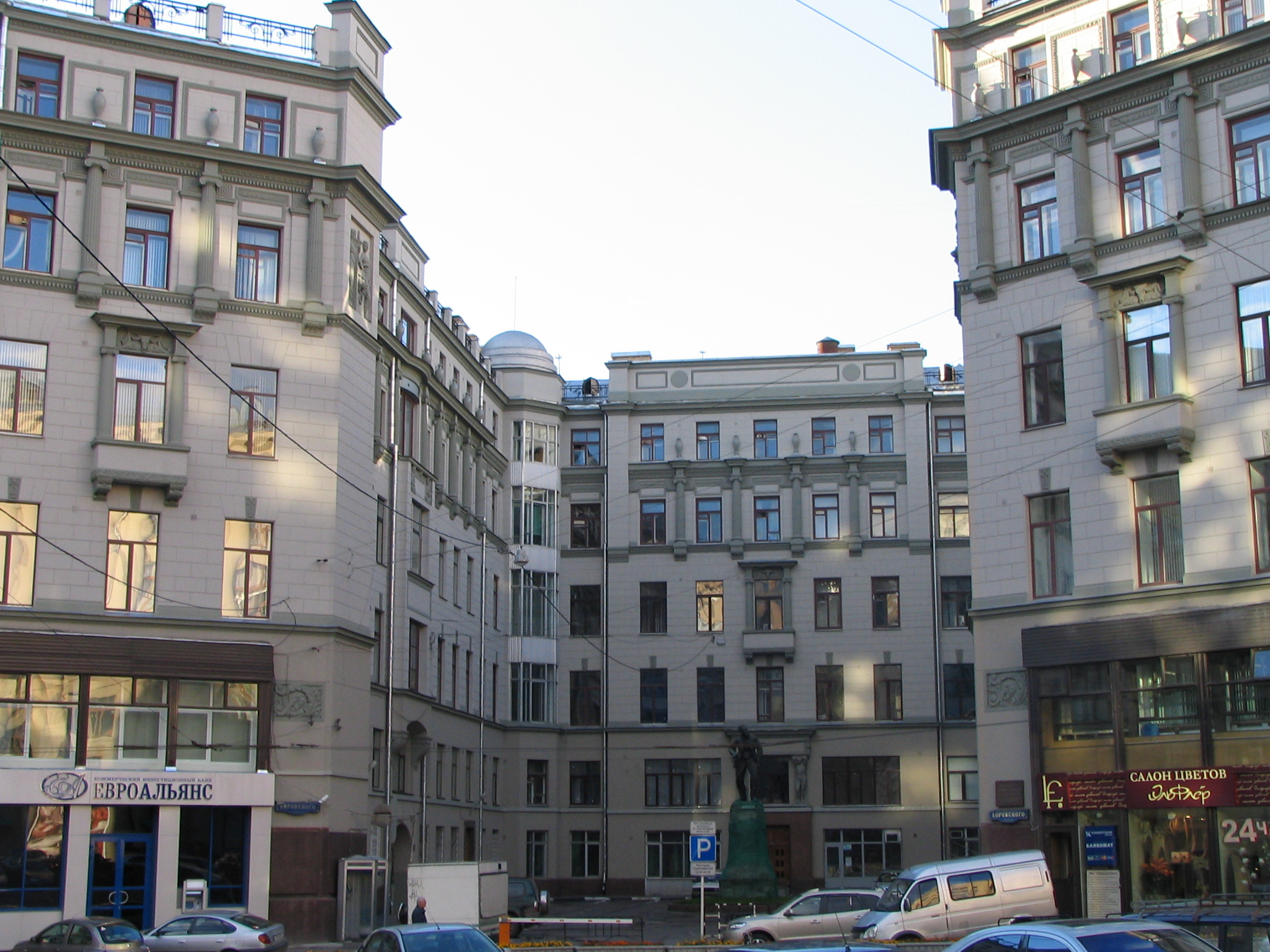 Bolshaya Lubyanka Street,5